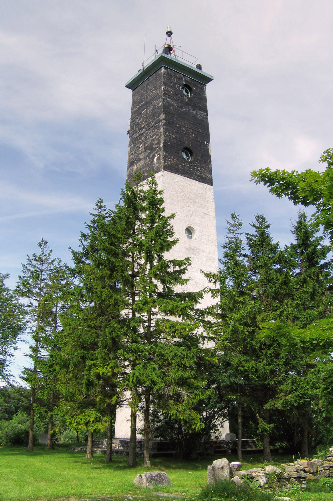 Anseküla tuletorn